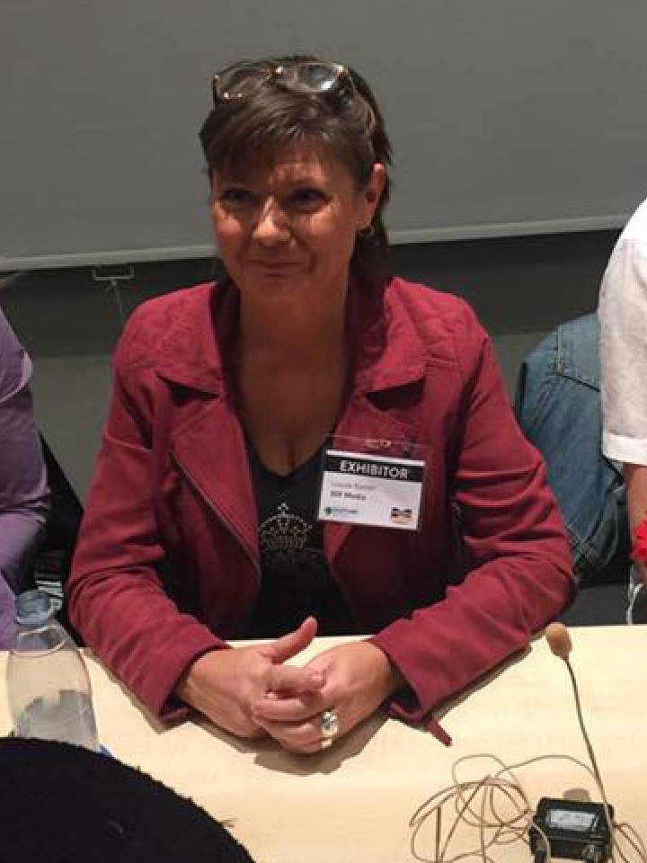 Louise Raeder på Kistamässan, 16 september 2017